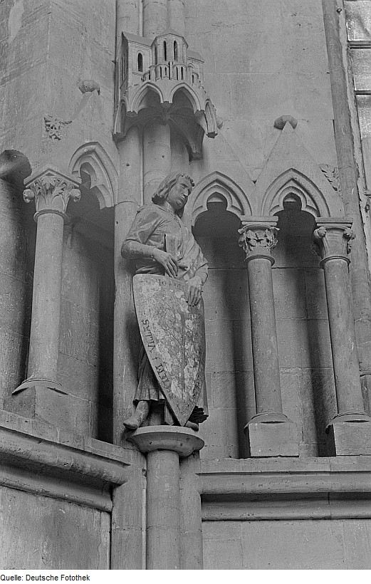 Original image description from the Deutsche FotothekStifterfigur Thimo von Kistritz' im Westchor